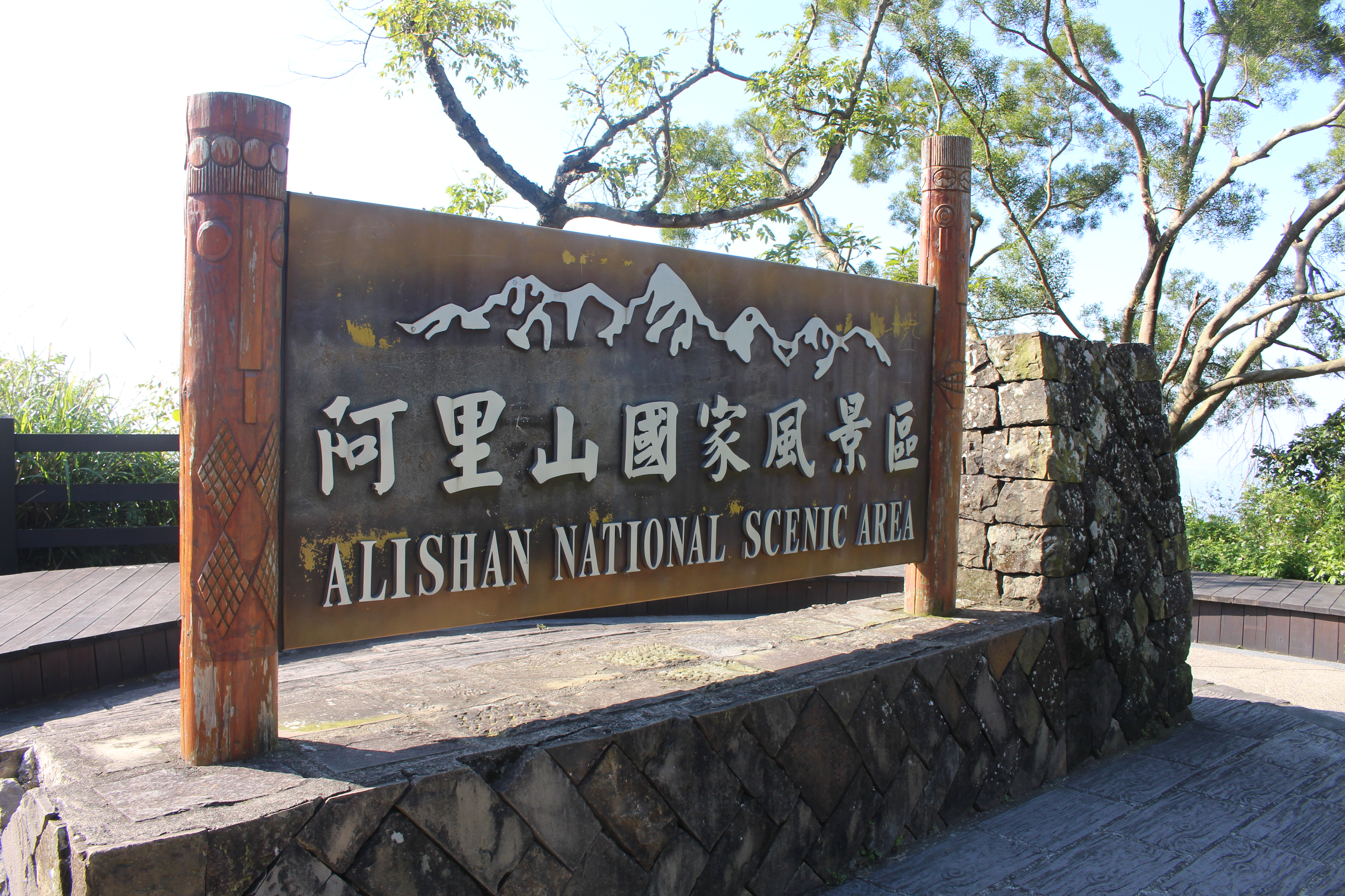 阿里山國家風景區標誌立牌。